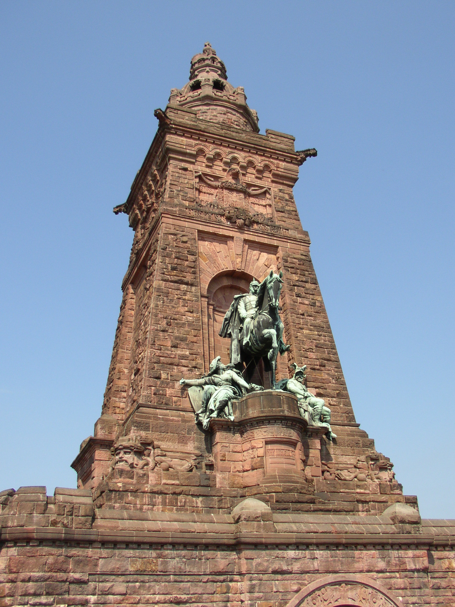 Kyffhäuserdankmal